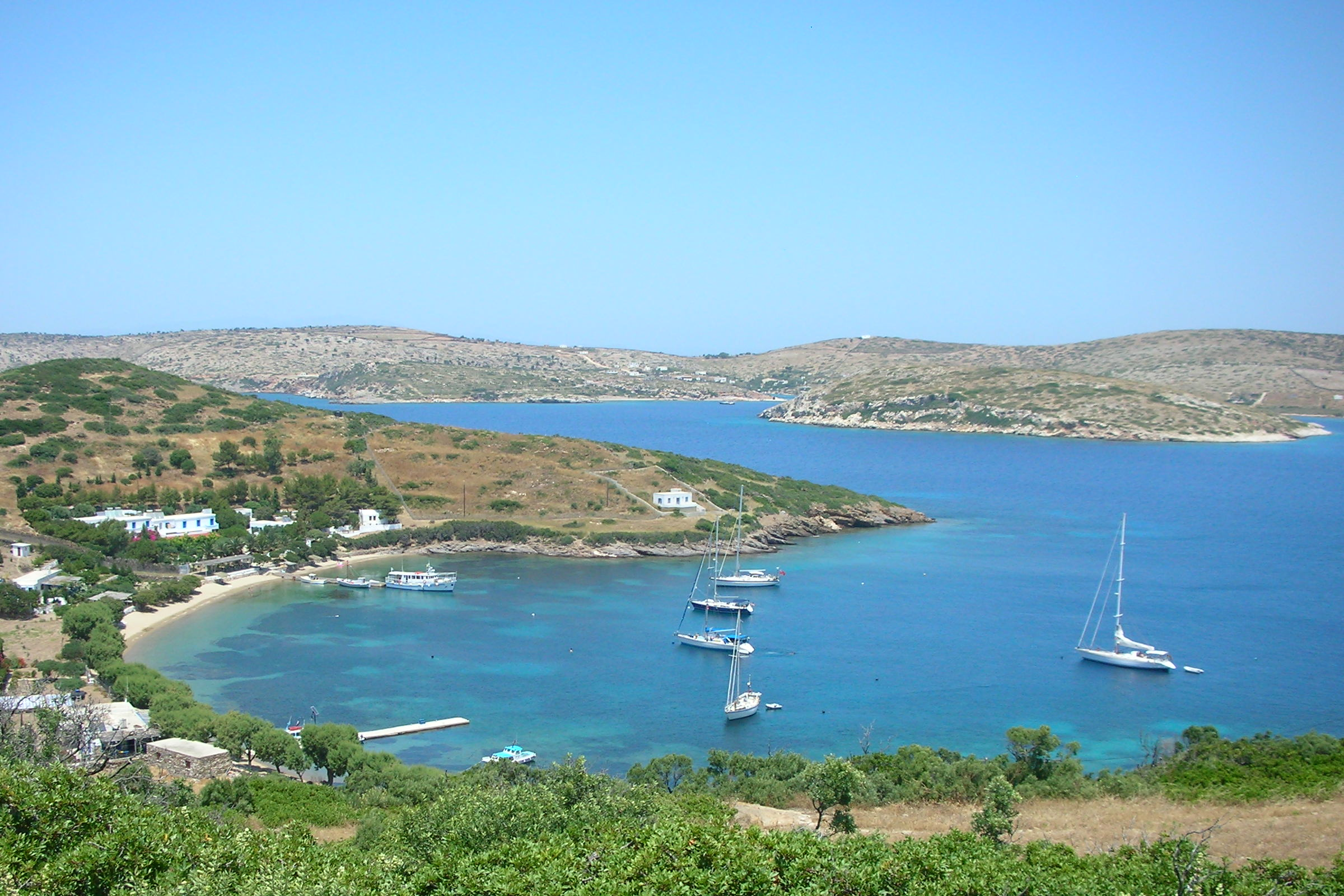 Spalathronisi (rechts) von Marathi aus gesehen